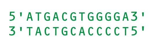 Uma ilustração de uma seqüência de DNA